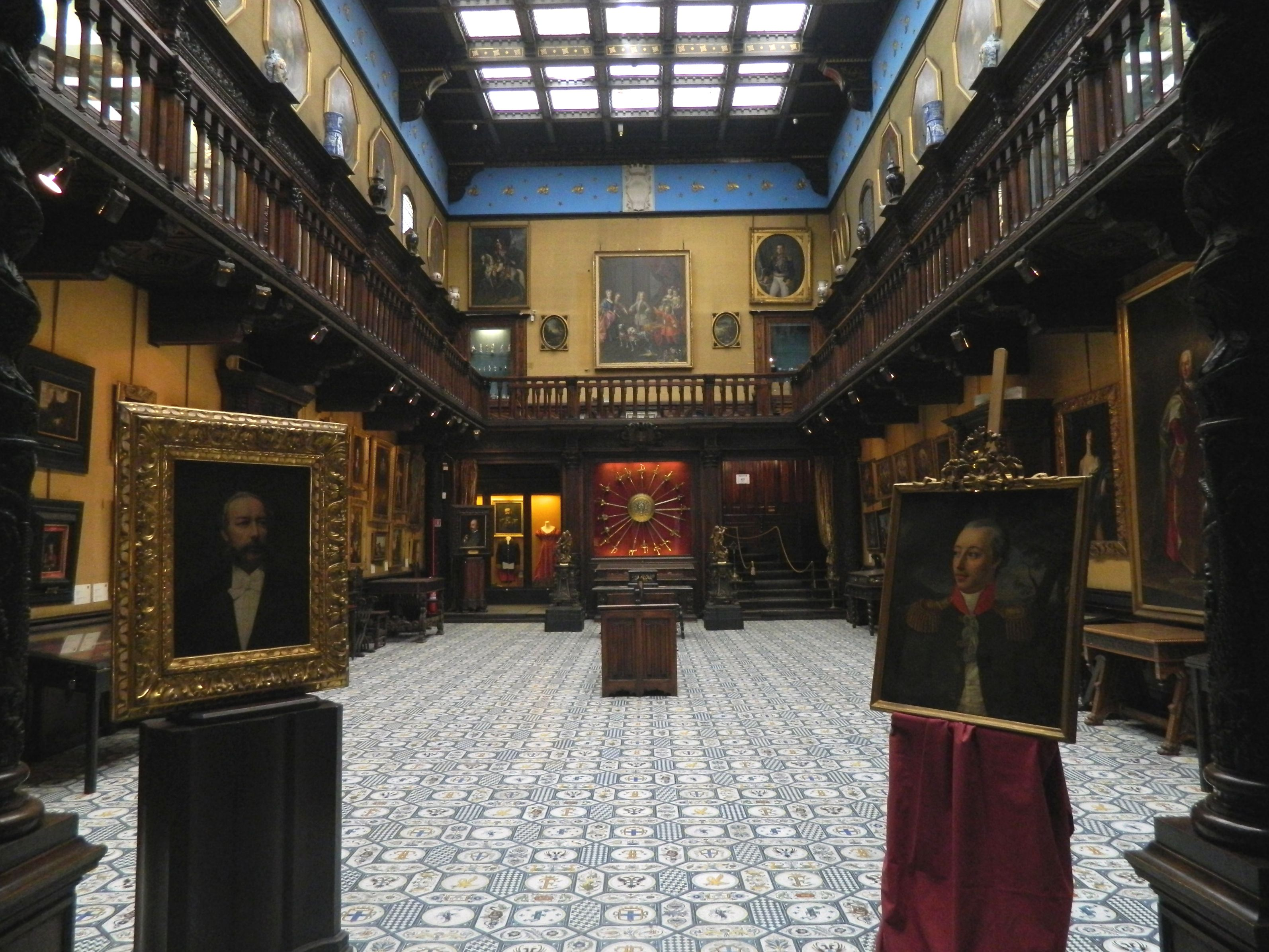 Museo Civico Gaetano Filangieri (Palazzo Como), Napoli.